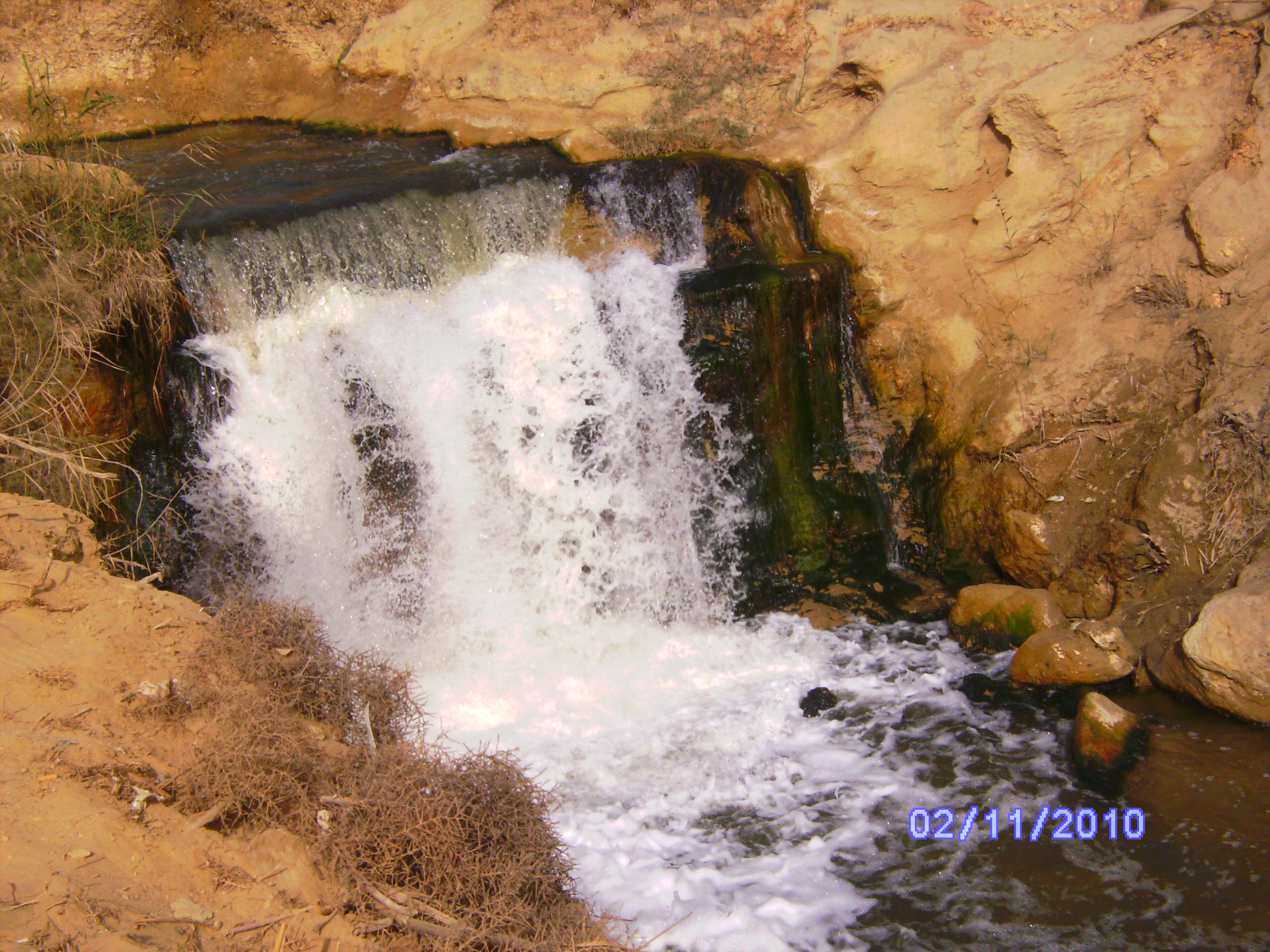 شلالات محمية وادي الريان